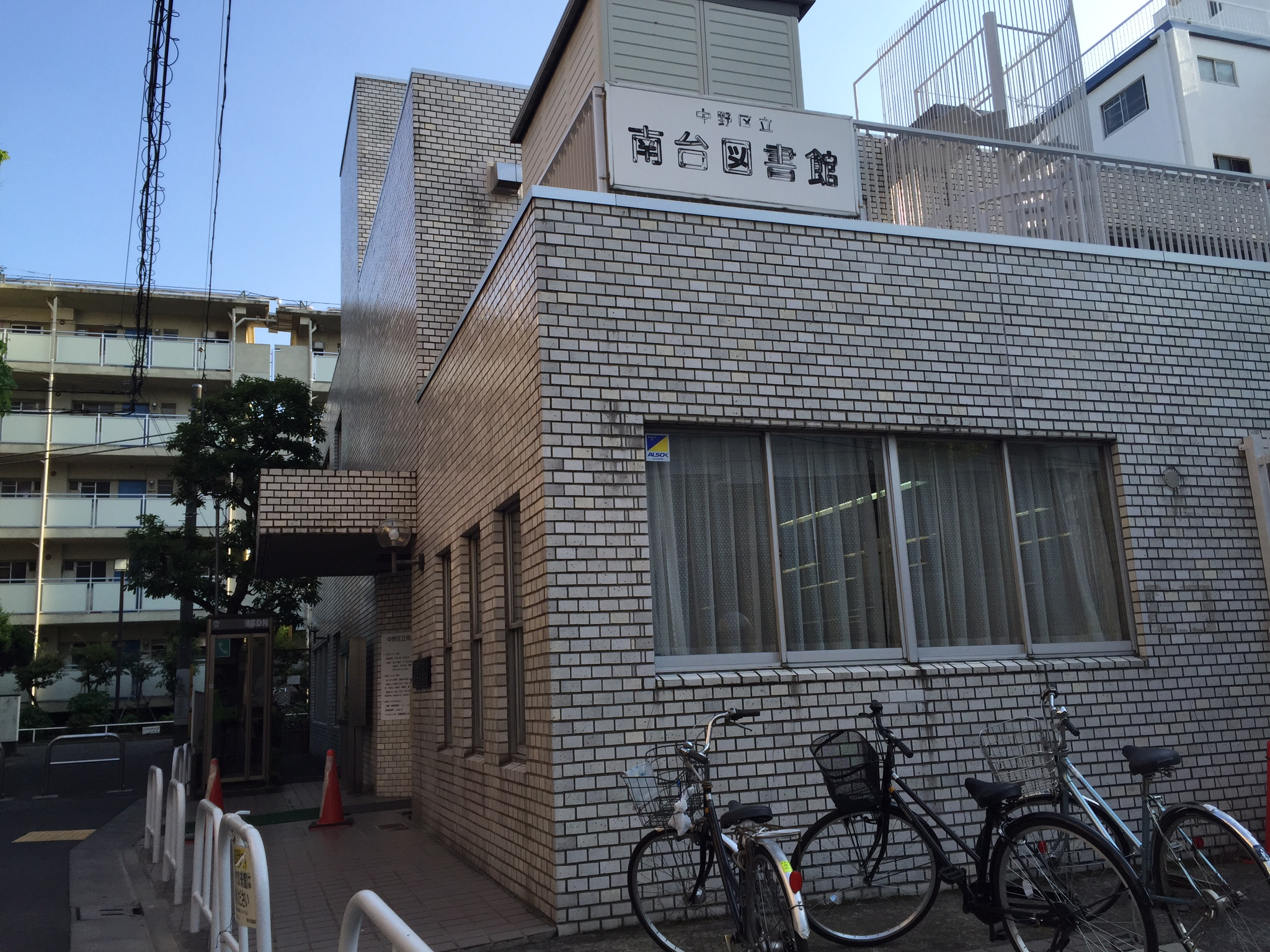 日本東京都中野区立南台図書館